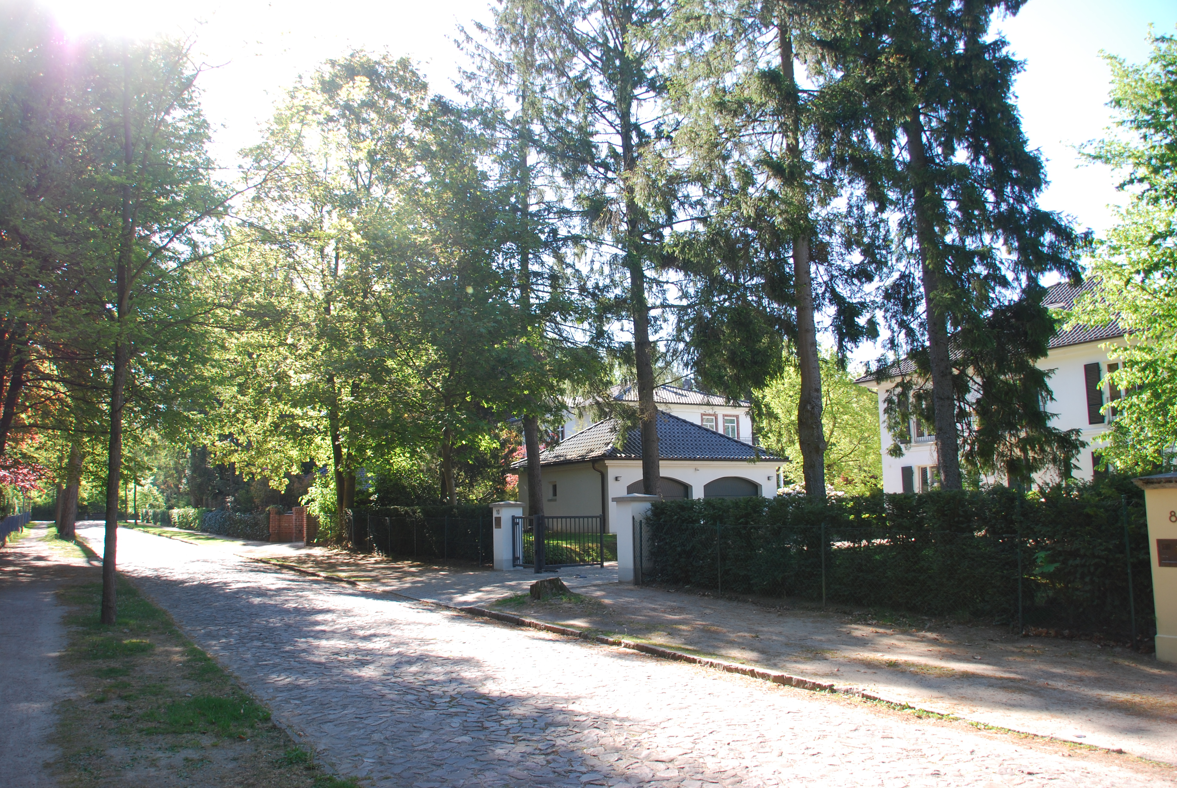 Wohltorf, ruhige Wohnstraße.